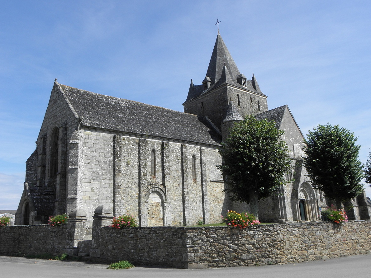 Façade occidentale et flanc méridional de la nef romane de la chapelle ND de Kernitron en Lanmeur (29).